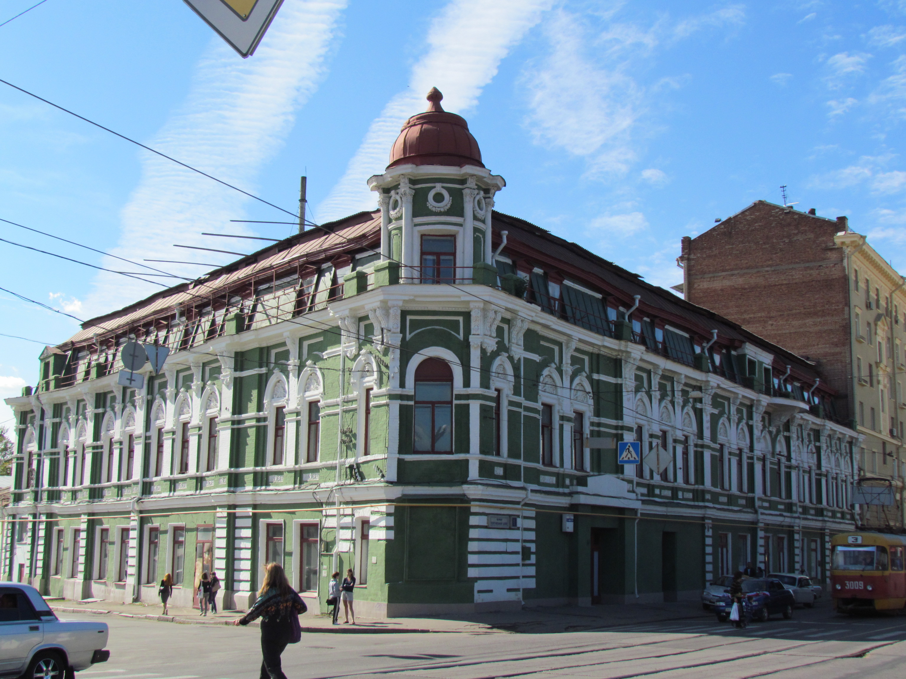 Україна, Харків, вул. Полтавський Шлях, 1